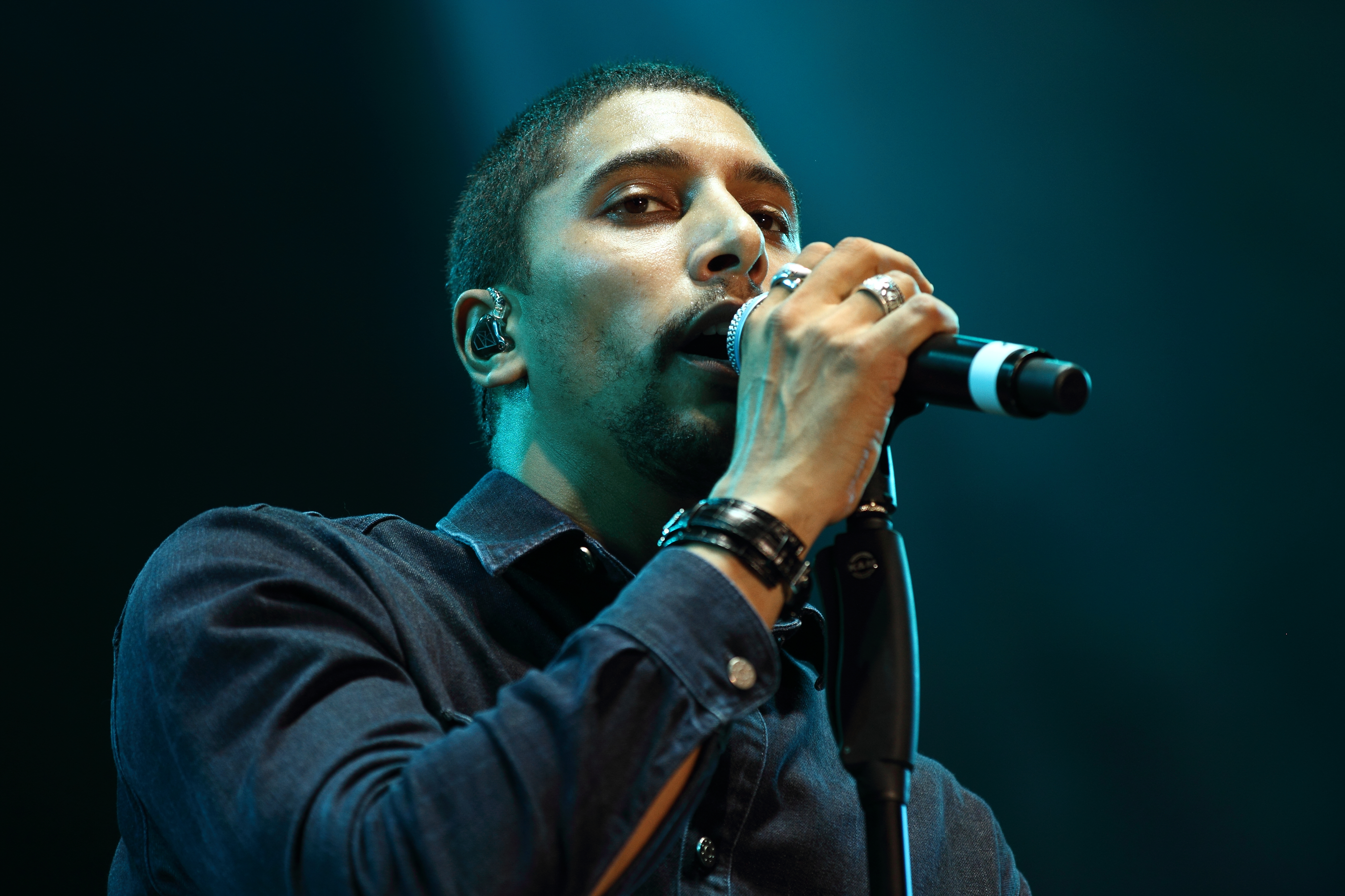 Andreas Bourani auf dem ENERGY IN THE PARK Festival 2014 Festivalsommer This photo was created with the support of donations to Wikimedia Österreich and Wikimedia Deutschland in the context of the CPB project "Festival Summer". For taking this photo and licensing it under a free licence a (press) accreditation was required. The photographer had a valid accreditation and has sent it to the email response team, it has been archived in the OTRS system. Users with OTRS account can access it here. Please be aware that (press) accreditations are a permission to generally take photos only and do not make any statement about the copyright status of this photo! Link to the ticket: Personality rights warningAlthough this work is freely licensed or in the public domain, the person(s) shown may have rights that legally restrict certain re-uses unless those depicted consent to such uses. In these cases, a model release or other evidence of consent could protect you from infringement claims.